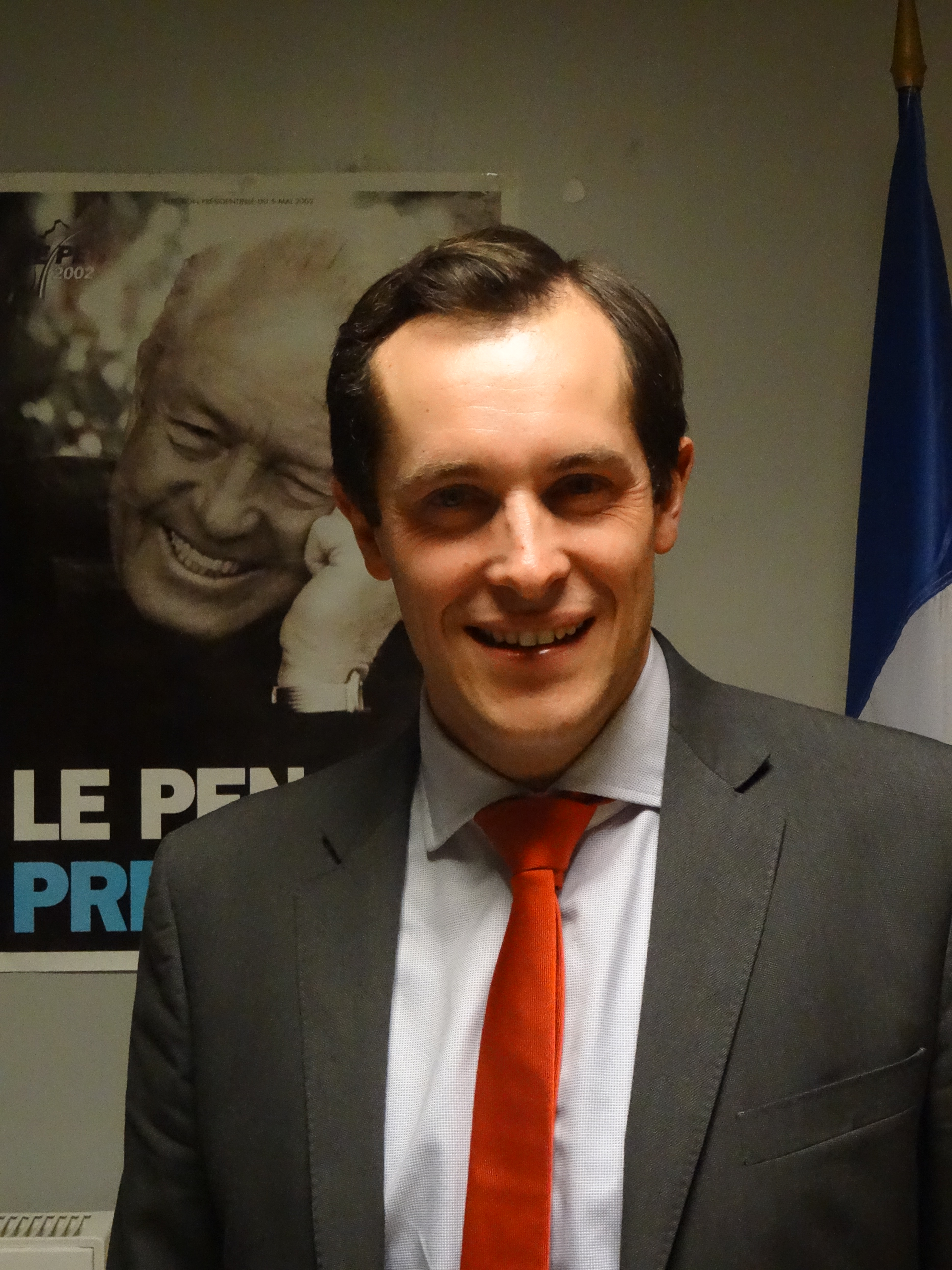 Réunion du Front national avec Guy Cannie et Nicolas Bay à Valenciennes le 23 janvier 2015. Depicted person: Nicolas Bay